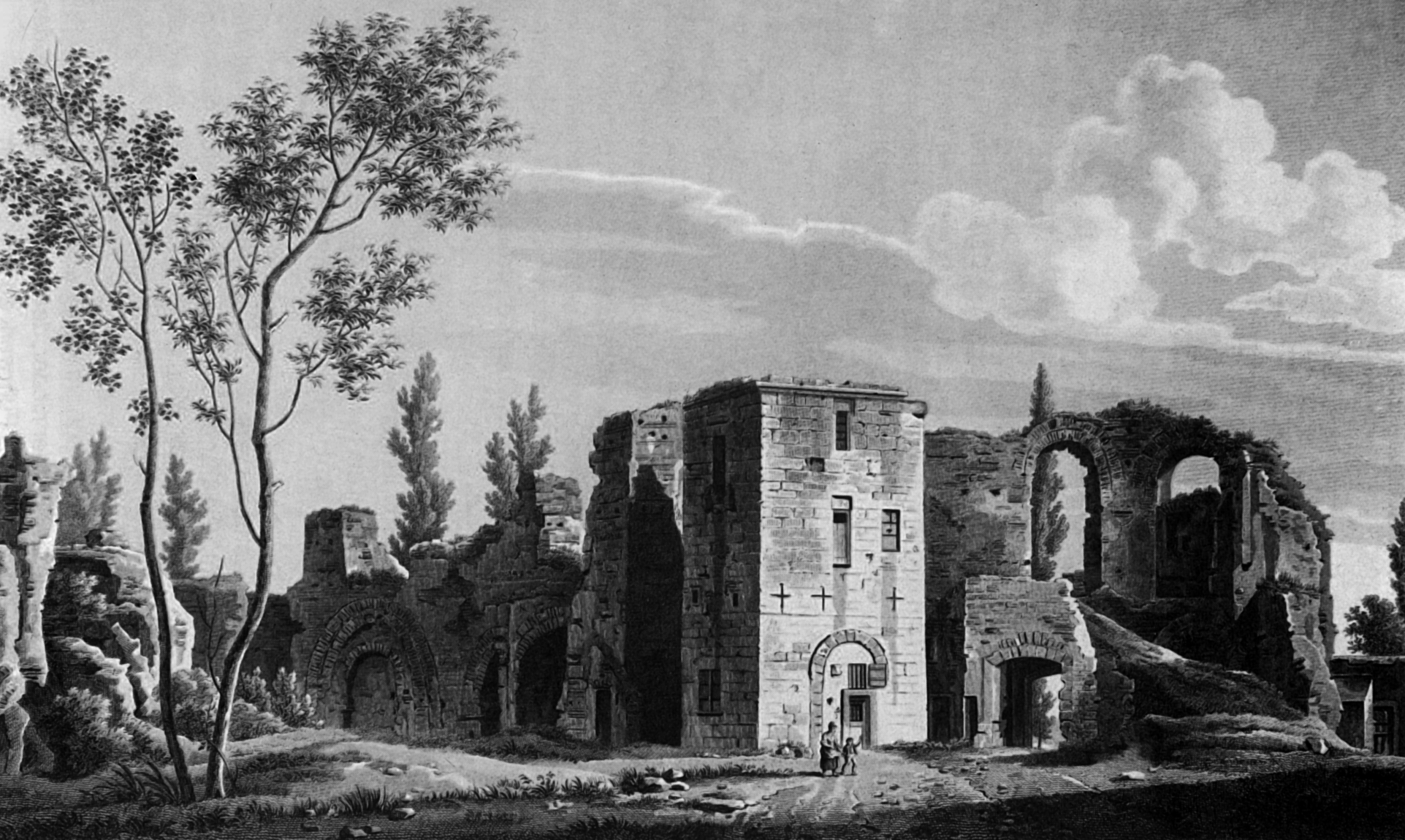 Kupferstich von Pillement und Gossard nach Jacques Martin Silvestre Bence. Aus: Les monumens de la France von Alexandre de Laborde, erschienen zwischen 1816-1836 in Paris. Blick in das Caldarium der Kaiserthermen zu Trier mit dem Altport, dem zwischen 1102–1124 eingerichteten Stadttor. Der Wachturm wurde 1806 abgerissen, das Stadttor 1817 aufgegeben.